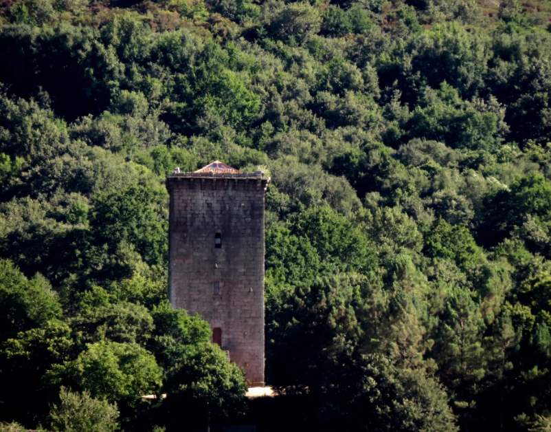 vista a distancia